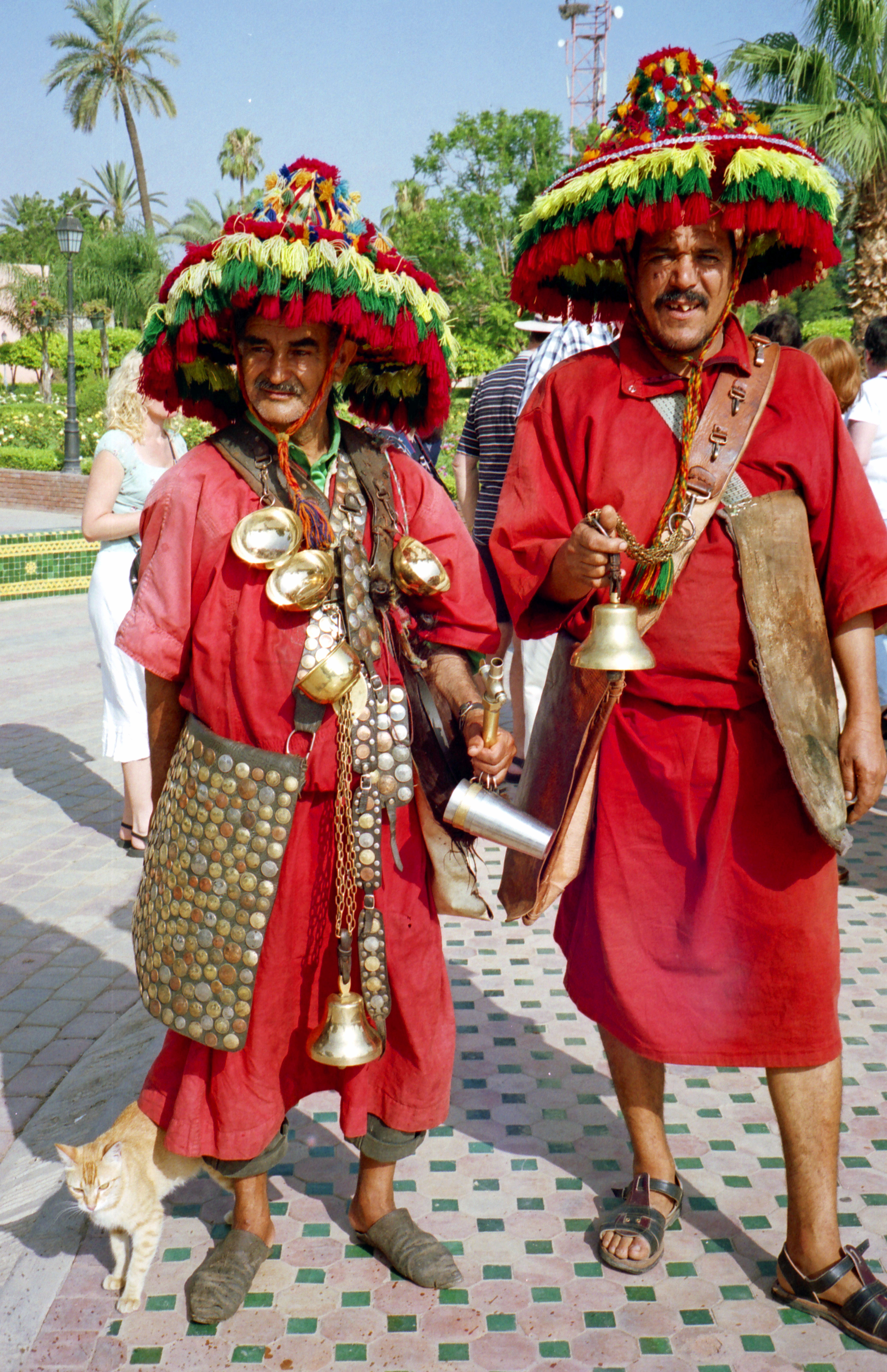 Morocco-61